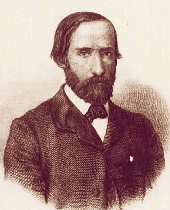 Miguel Luis Amunátegui Aldunate (Santiago; 11 de enero de 1828- Santiago; 22 de enero de 1888), historiador y político chileno, hermano del también destacado historiador, Gregorio Víctor Amunátegui Aldunate.